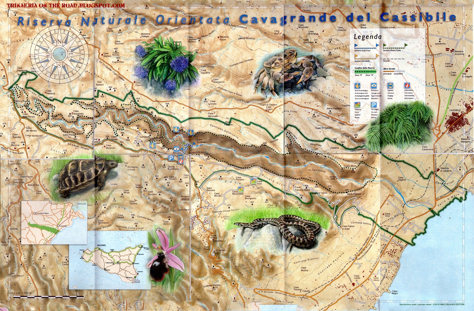 Foto descrivente la mappa della riserva naturale orientata di Cavagrande del Cassibile